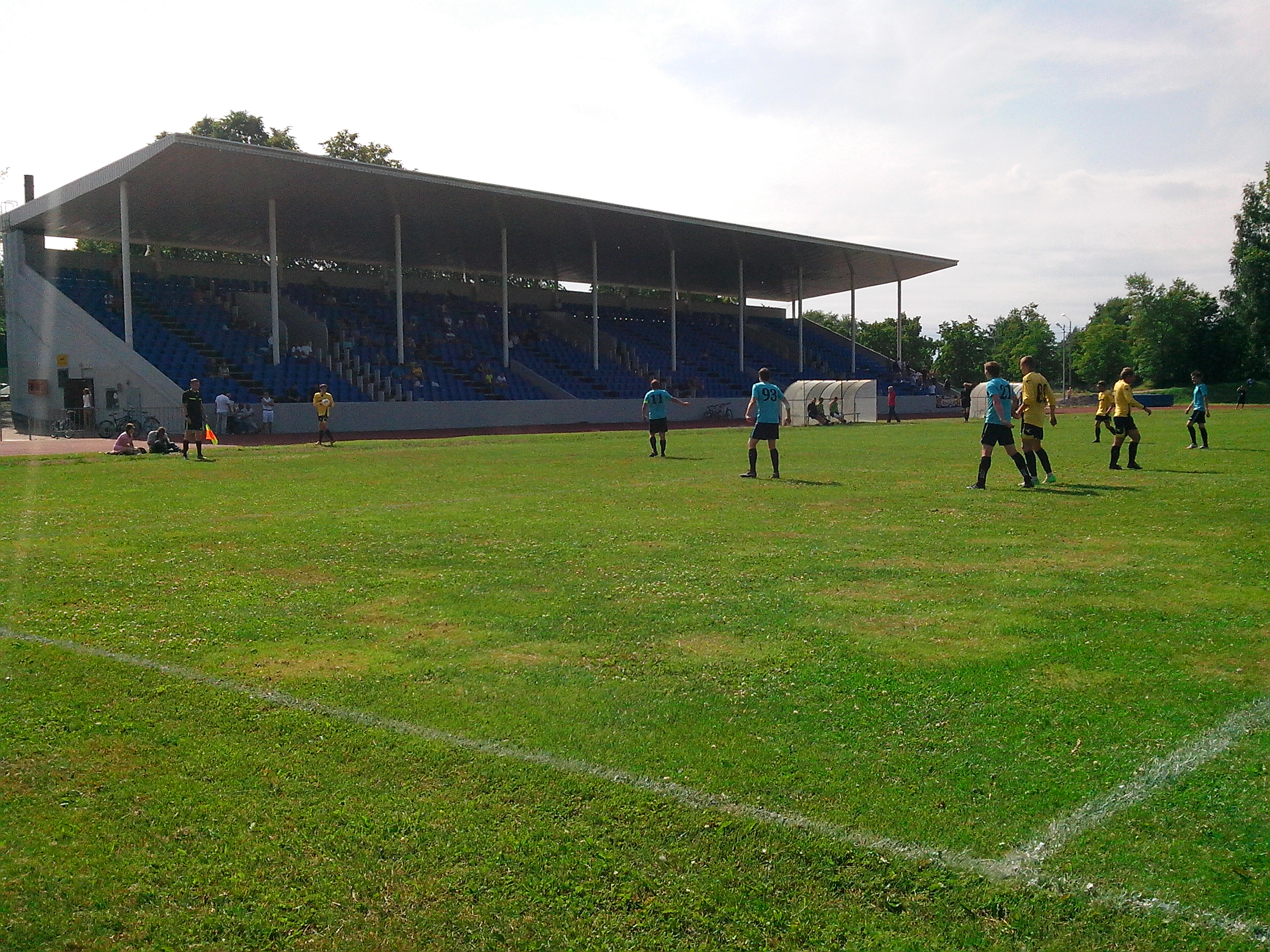 Стадион Авангард в Выборге